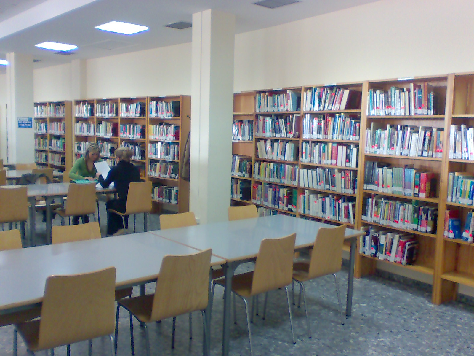 Biblioteca Municipal de Dos Hermanas (provincia de Sevilla).